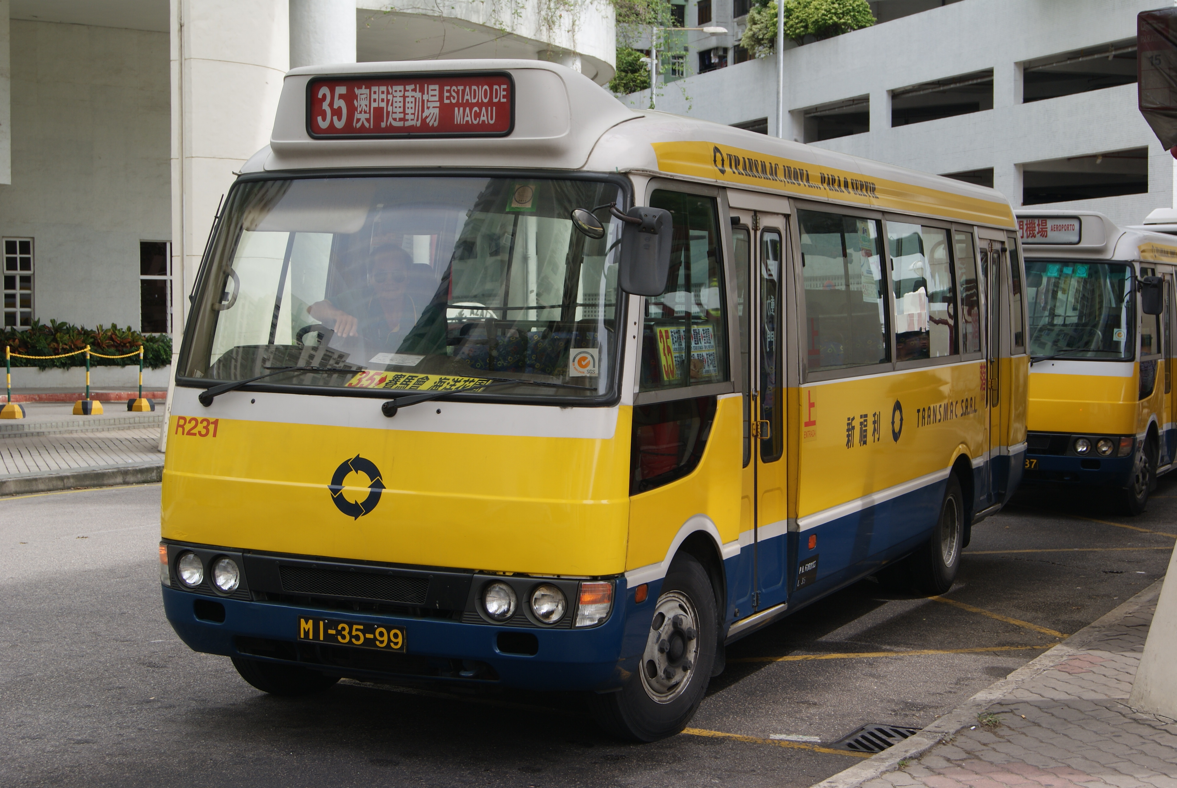 新福利三菱Rosa R231行駛35路線